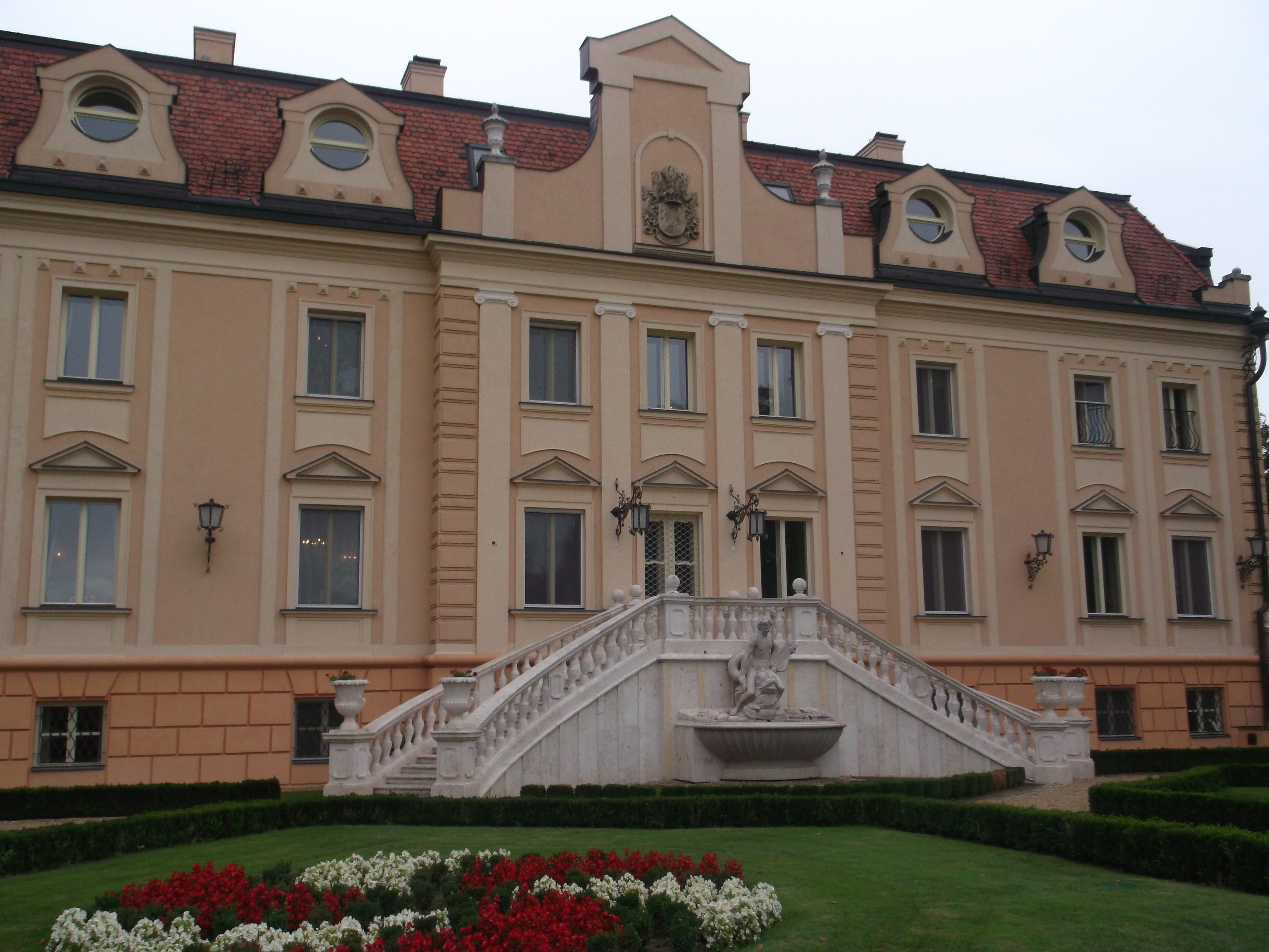 Szapáry Kastély Sorokpolány 2013 Sept. This is a photo of a monument in Hungary. Identifier: 9325